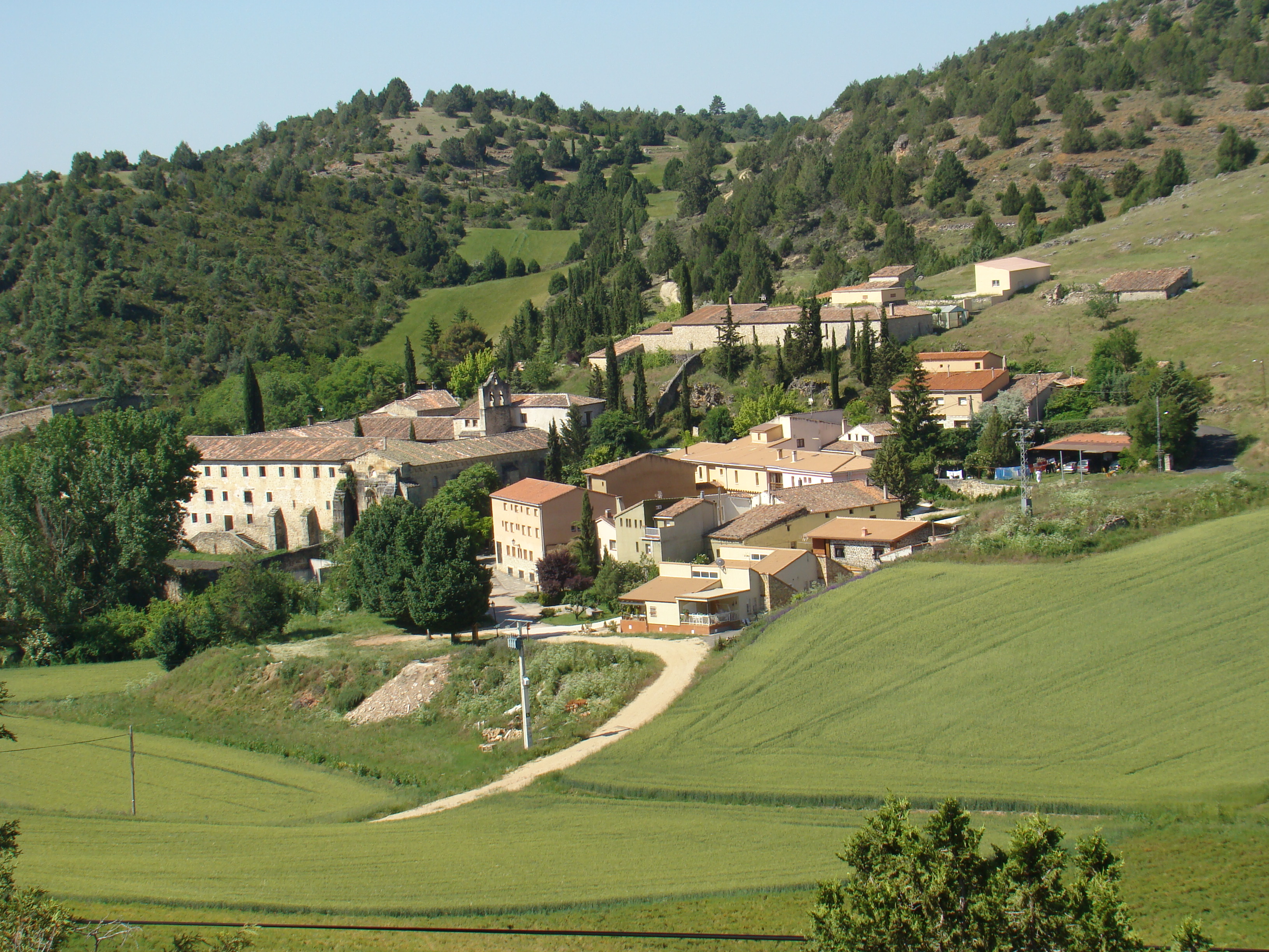 Vista a lo lejos de la localidad de La Buenafuente del Sistal, con el monasterio cisterciense a la izquierda. Provincia de Guadalajara (España).